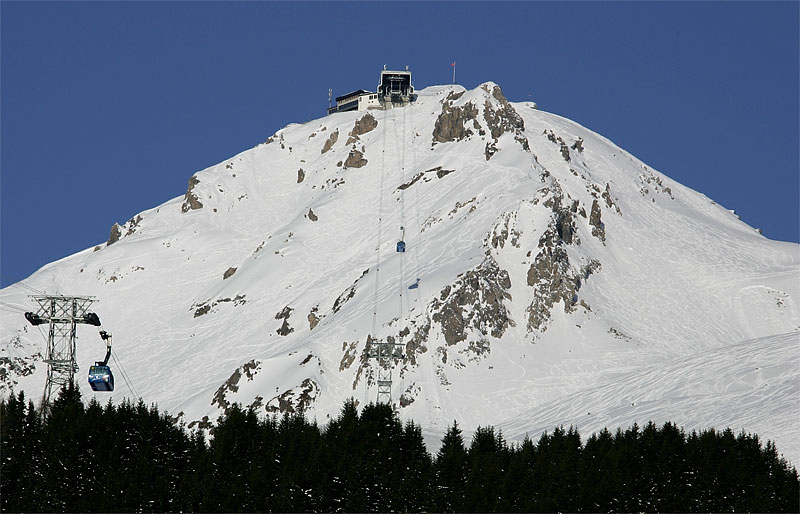 Blick zum Weisshorn ob Arosa